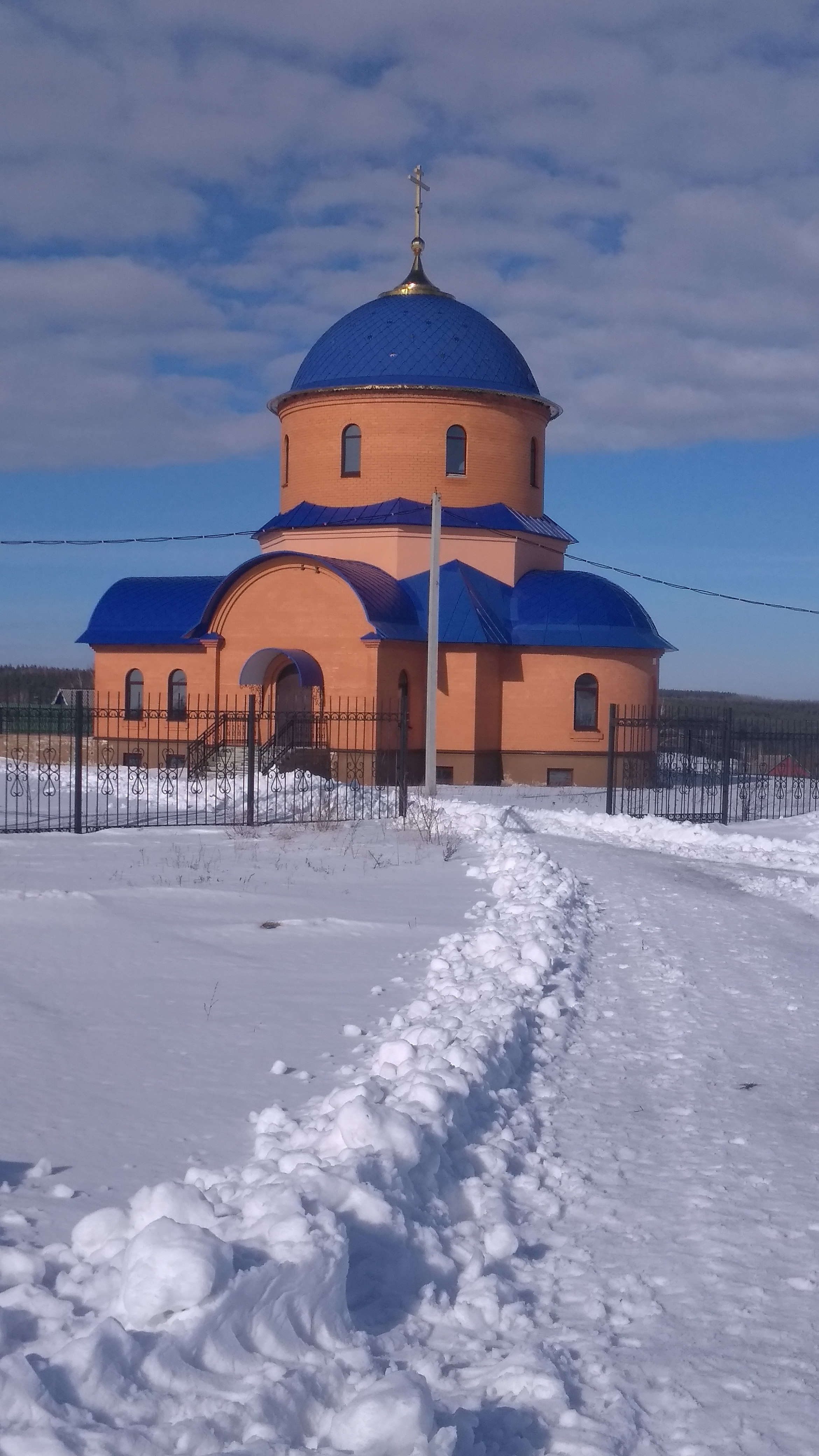 Храм Покрова Божией Матери села Белынь Пачелмского района Пензенской области, фото 20.02.2020